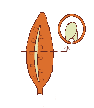 Morfología del fruto, folículo, aspecto general y sección transversal. Según Simpson (2005) Plant Systematics.